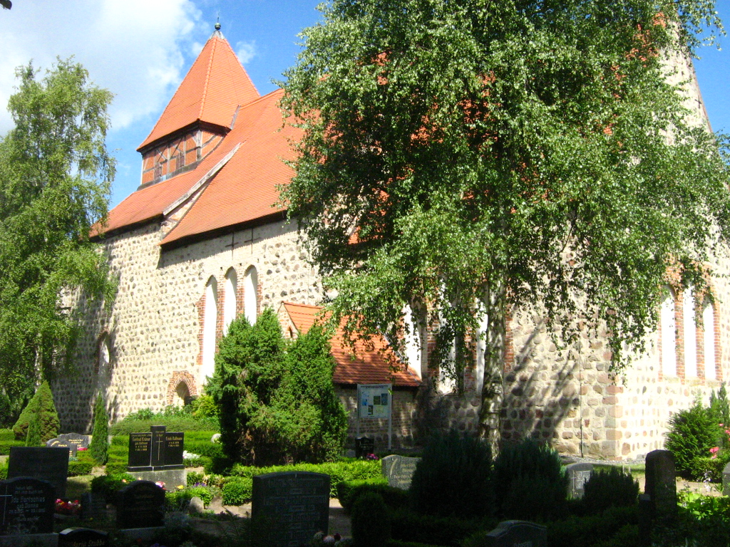 Die Kirche in Sanitz, Landkreis Bad-Doberan, Mecklenburg-Vorpommern.